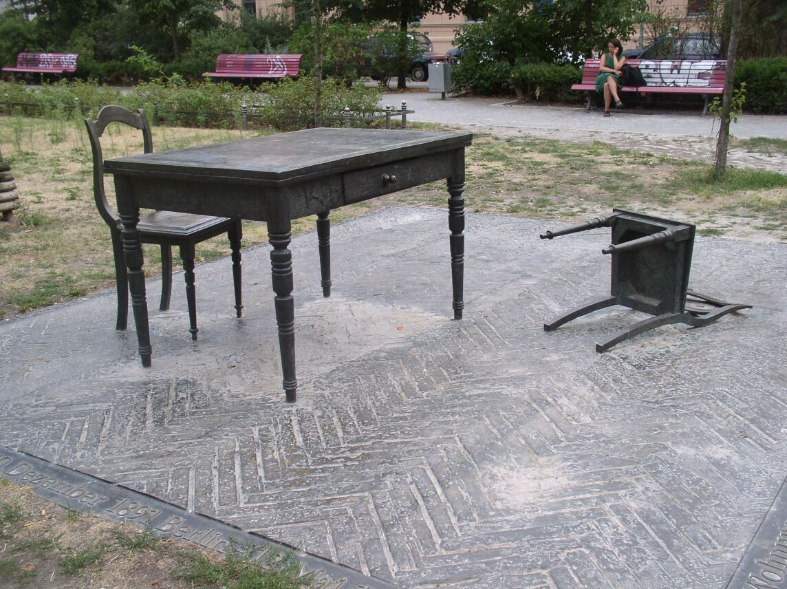 Koppenplatz in Berlin-Mitte, "Denkmal Der Verlassene Raum" (1995) by Karl Biedermann